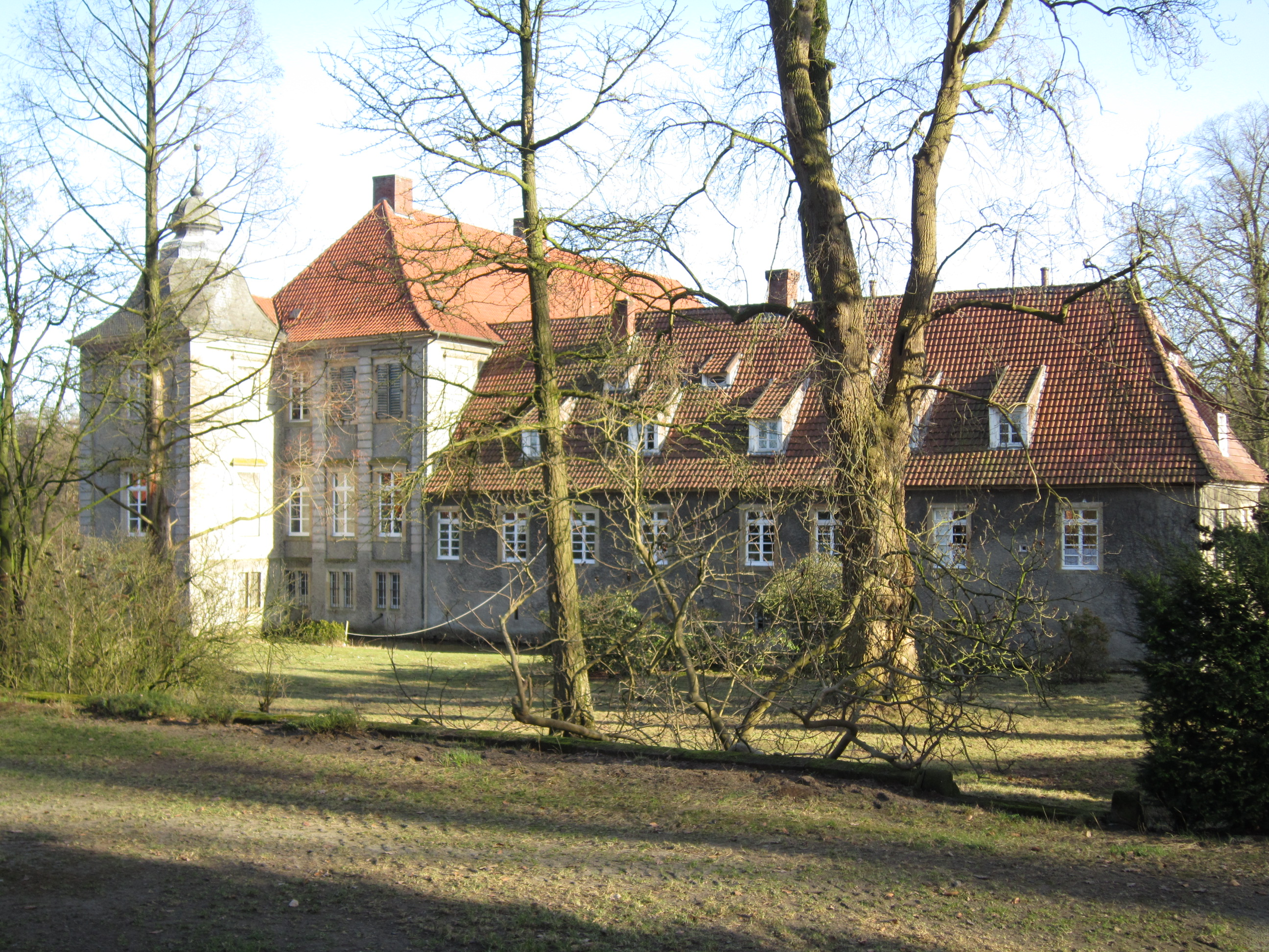 Schloss Eggermühlen im Landkreis Osnabrück